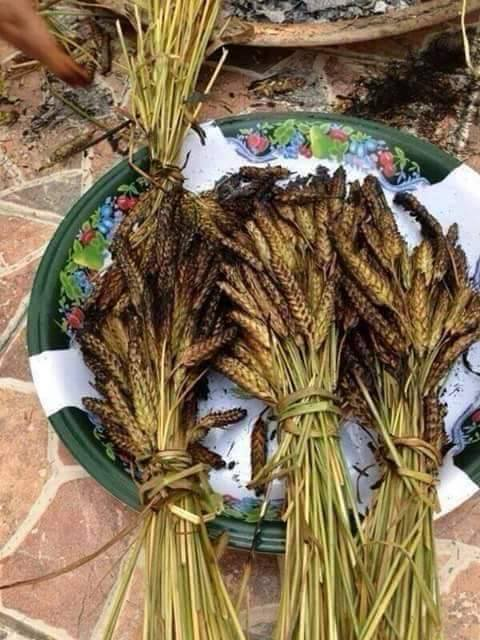 نئے فصل کی نئی غذا